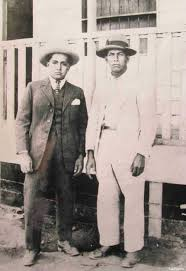 Fotografía de Naún Briones tomada en 1920 por Abdón Narváez.